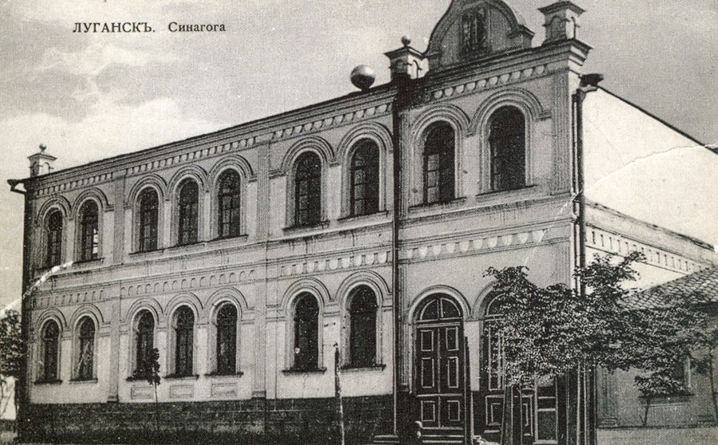 Хоральная синагога. Бывшая ул.Банковская (Т.Шевченко). Луганск